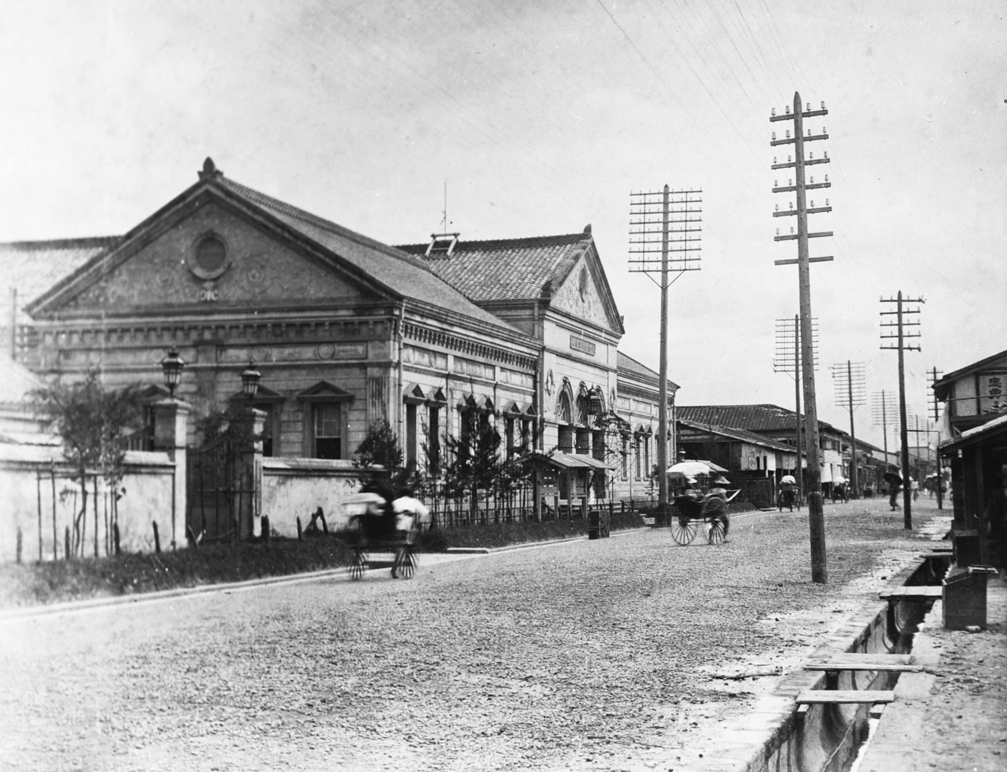 臺北市北門街臺北郵便局附近街景。